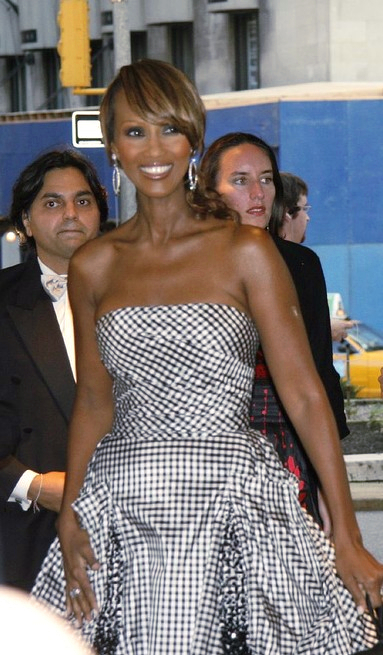 Supermodel Iman depicted person: Iman (age: 51.25)